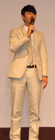 영화 포화속으로